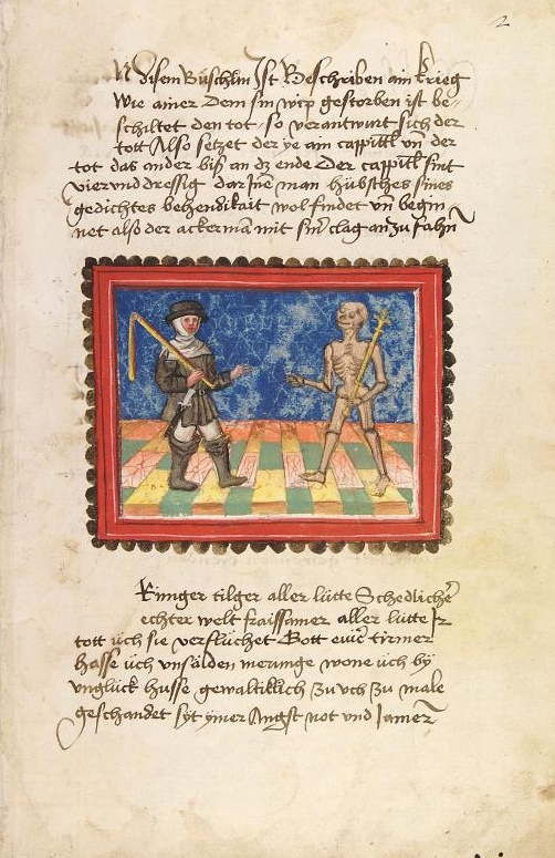 Johannes von Tepl: Der Ackermann aus Böhmen (Blatt 2r der Handschrift UB Heidelberg, Cod. pal. germ. 76)